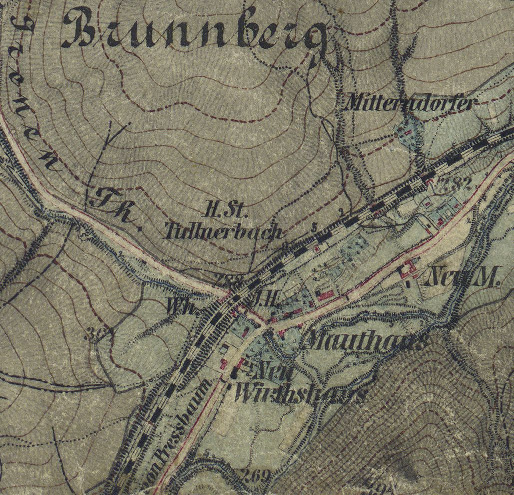 Neuwirtshaus (heute Untertullnerbach) und das alte Mauthaus (heute Neu-Purkersdorf). Haltestelle Tullnerbach (heute Untertullnerbach). Der Beginn des Irenen-Tahls. Unten die alte Schleife des Wien-Flusses (heute Agip-Tankstelle und Gelände der ehem. Frilla Leuchten die aus diesem Grund zur Geminde Purkersdorf gehören.) Der Tullnerbach folgt auch noch dem alten Verlauf.